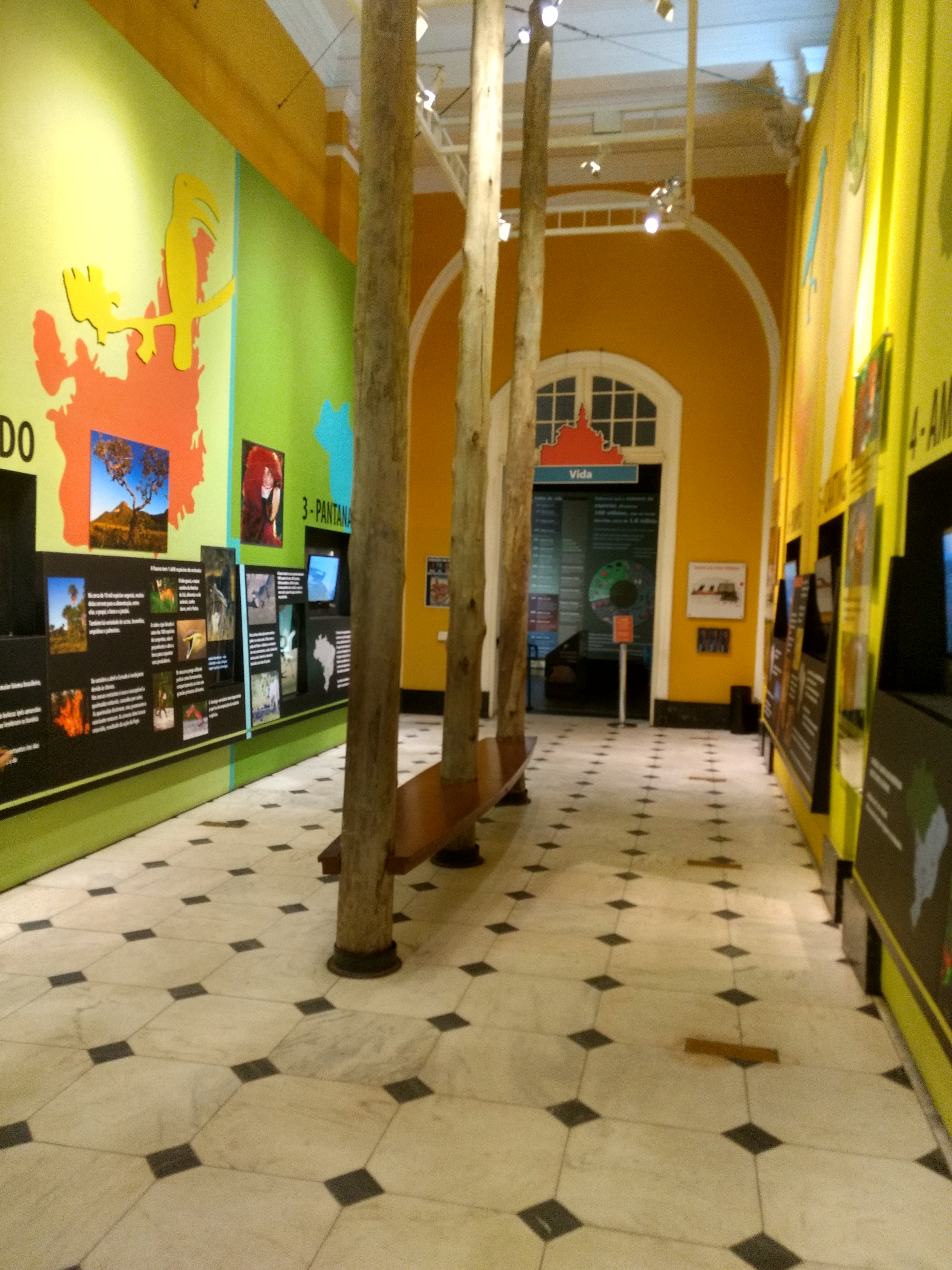 Catavento, sala.Sp.